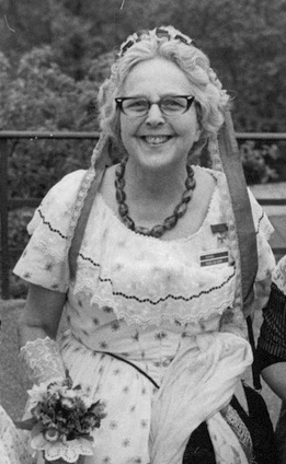 Fruarna Birgit Sommer, Gunnel Hazelius-Berg och Margit Siwertz bar tidstypiska kläder.Romantiken blommade på måndagskvällen på Solliden. Sällskapet Nya Idun höll vårfest i form av en musikalisk salong 1840 med Malla Montgomery-Silfverstolpe som värdinna. Gun Ankarcrona spelade Mallas roll. omgiven av skönt 1840-talsklädda gäster, bl.a. sällskapets sekreterare fil.dr. Birgitta Lager och sångerskan Iwa Voghera. Birgit Falkman-Sommer (piano), Karin Langebo (harpa) och Margot Rödin (sång) underhöll och Margareta Kjellberg läste romantiska dikter. Före middagen bjöd sällskapets ordförande Gunnel Hazelius-Berg de cirka nittio deltagarna på ett glas sherry i sitt hem i Sagaliden på Skansen. Många i dräkter, andra helt vanligt vårfinklädda.